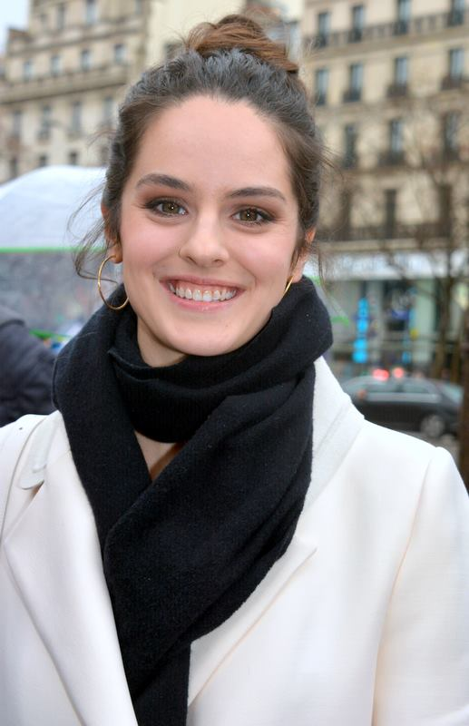 Noémie Merlant au déjeuner des nommés des César du cinéma.